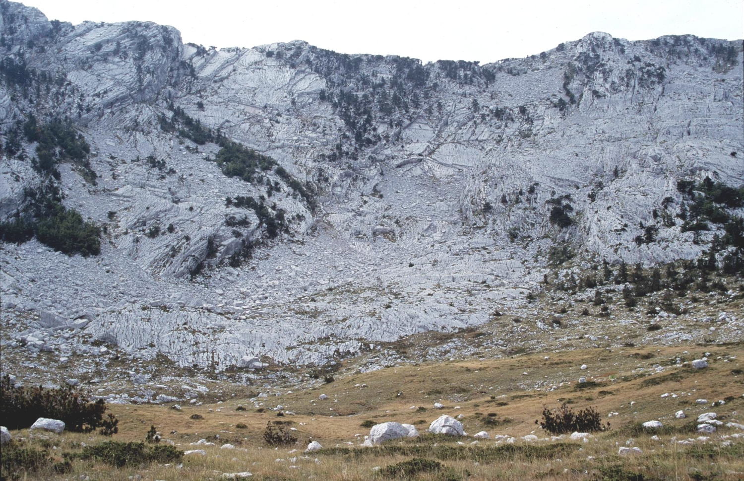 Glaziale Spuren finden sich in allen Hochgebirgen der Dinariden. Hier im Orjen